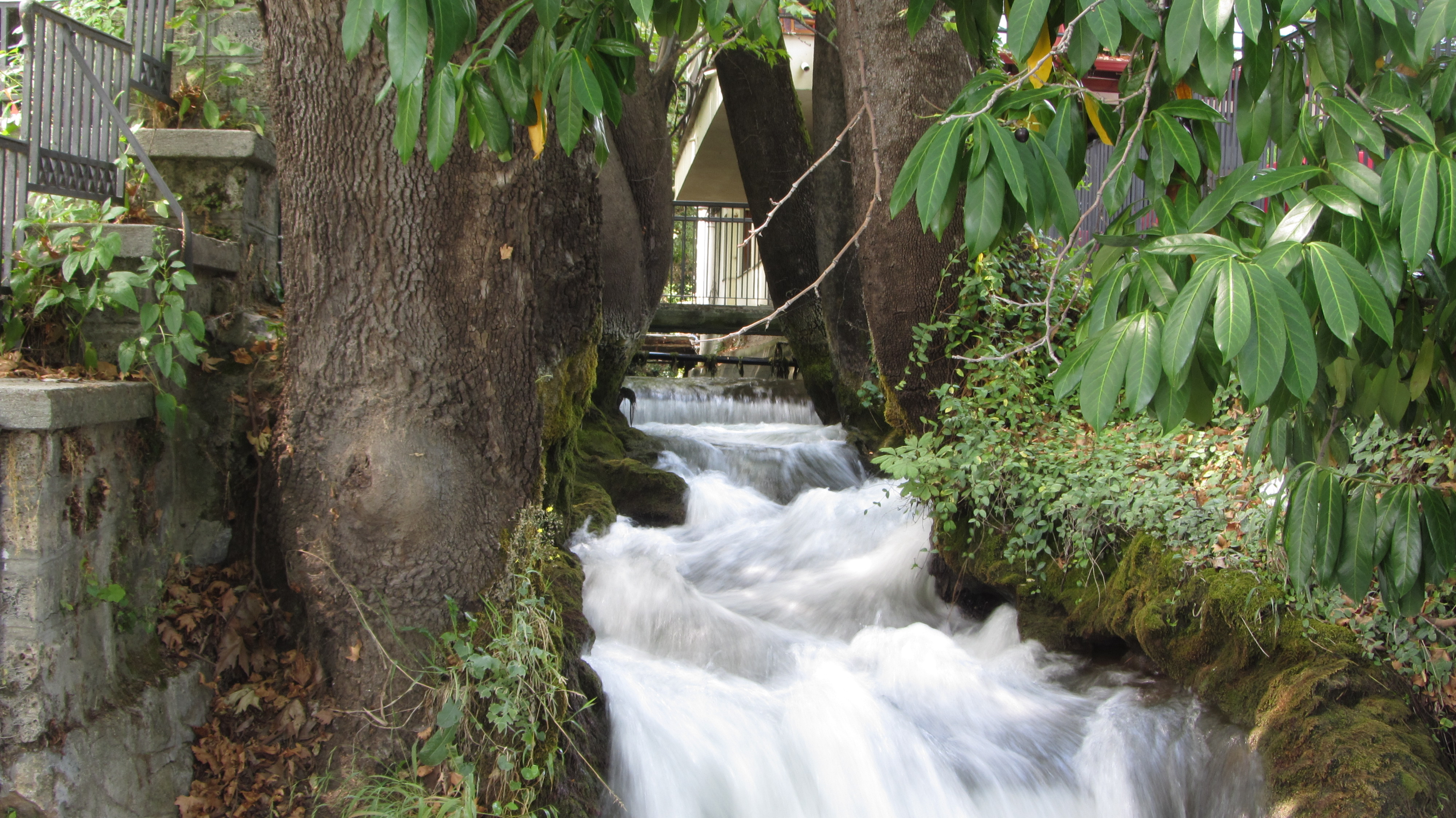 Поток воды в парке водопадов в Эдессе